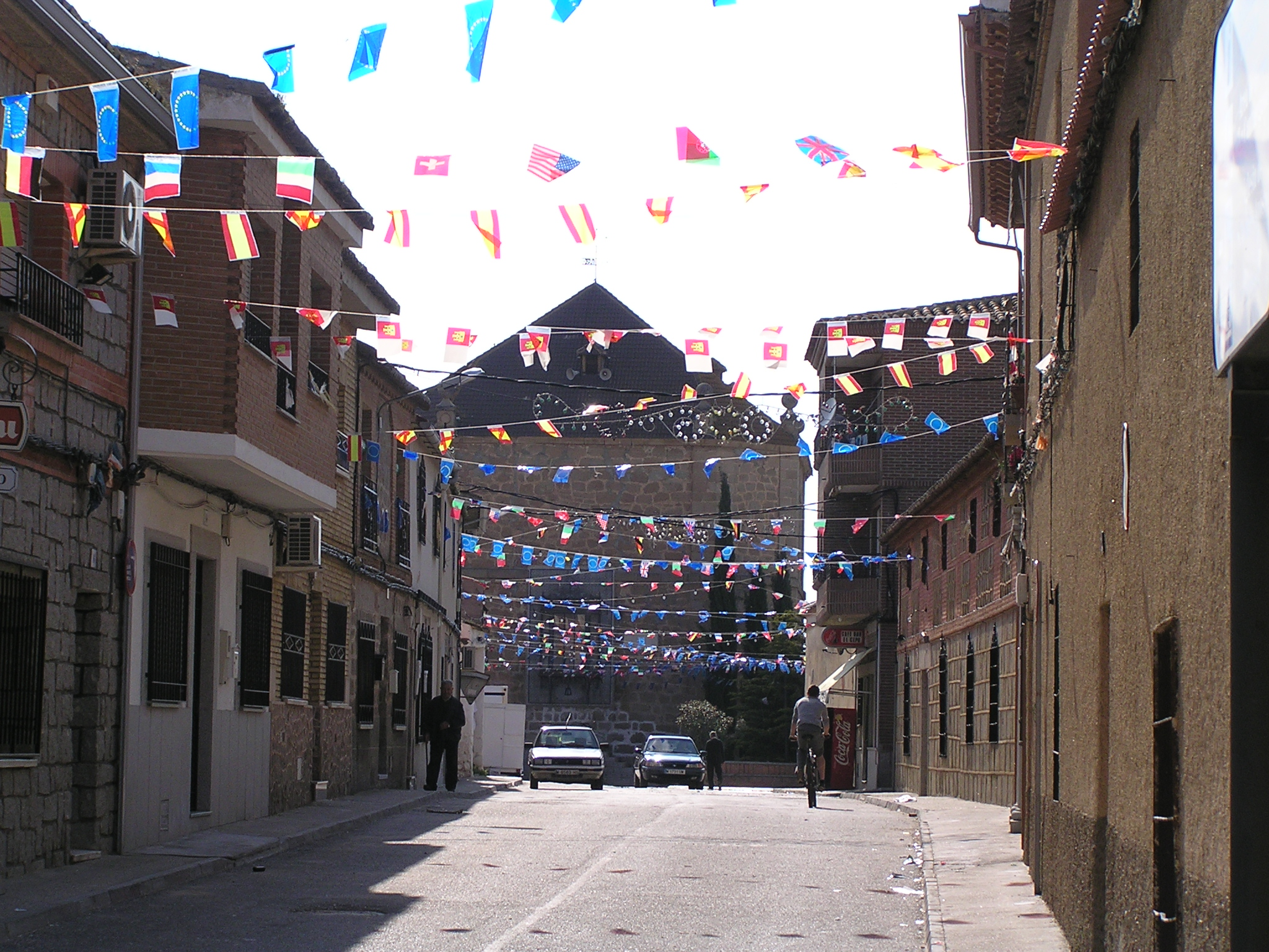 Entrada a la plaza de San Martín de Montalbán, desde la calle principal (en fiestas).